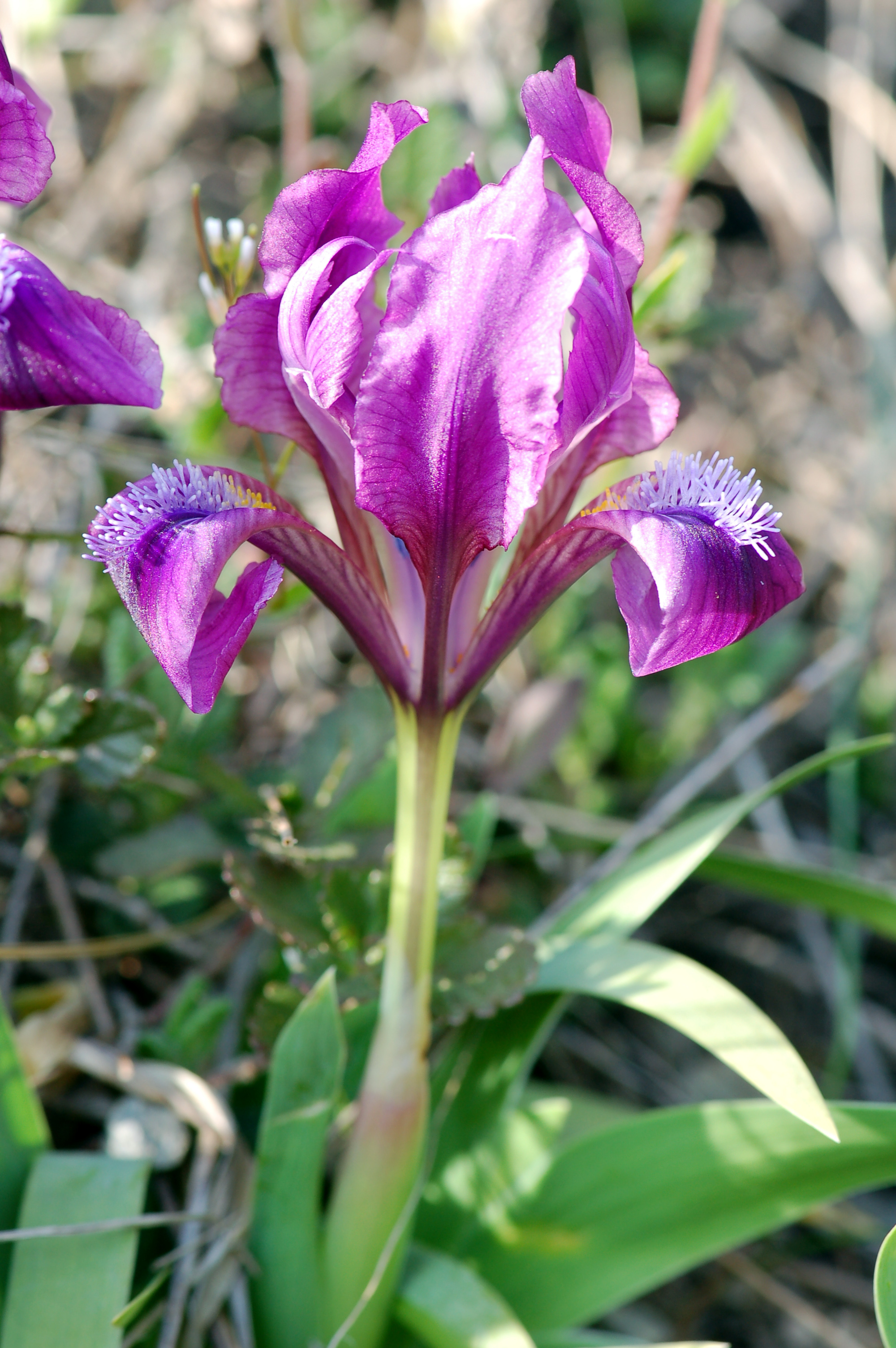 Iris Pumila, gefunden am Westhang des Braunsberges, Niederösterreich